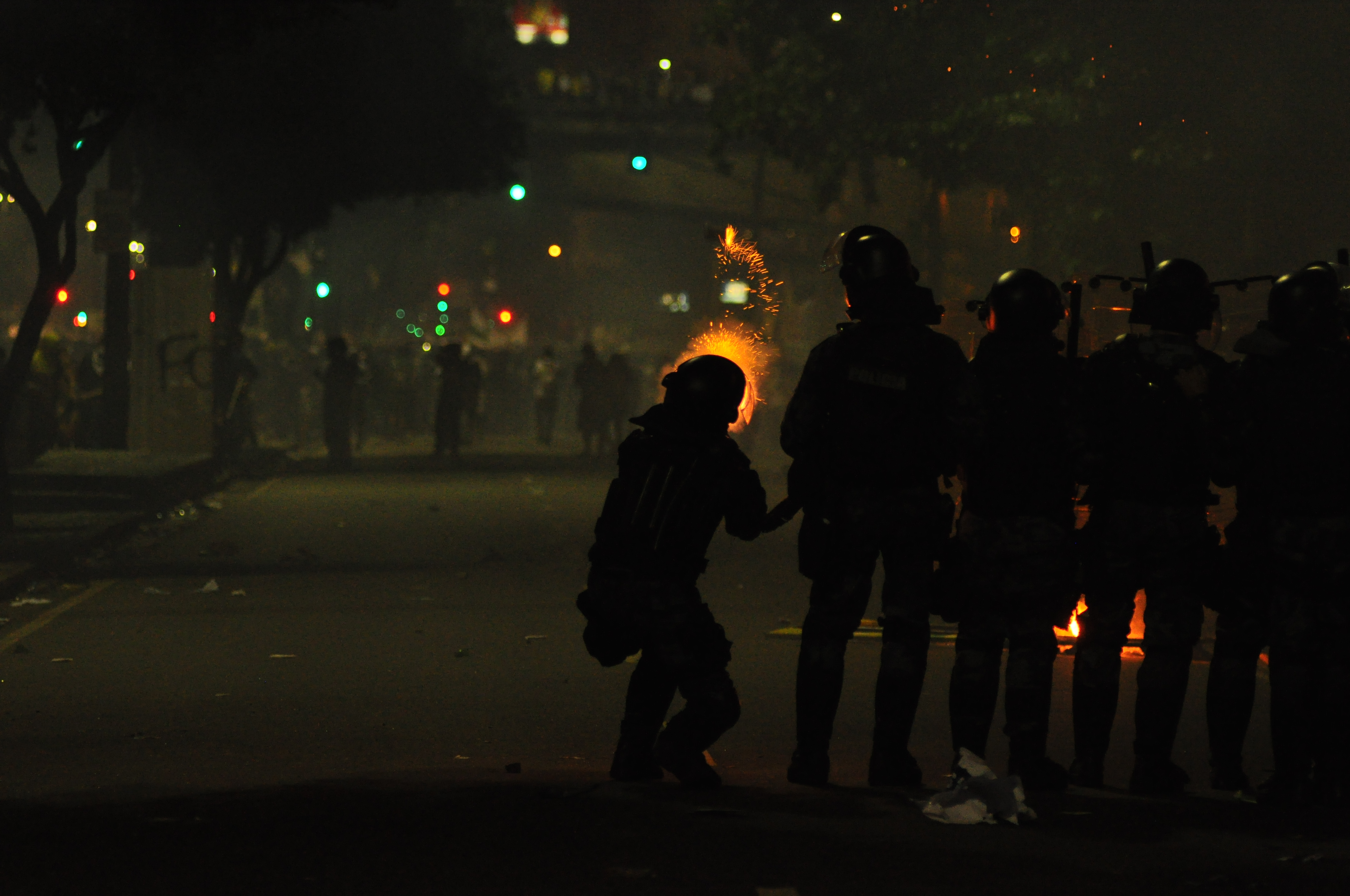 Bomba de gas